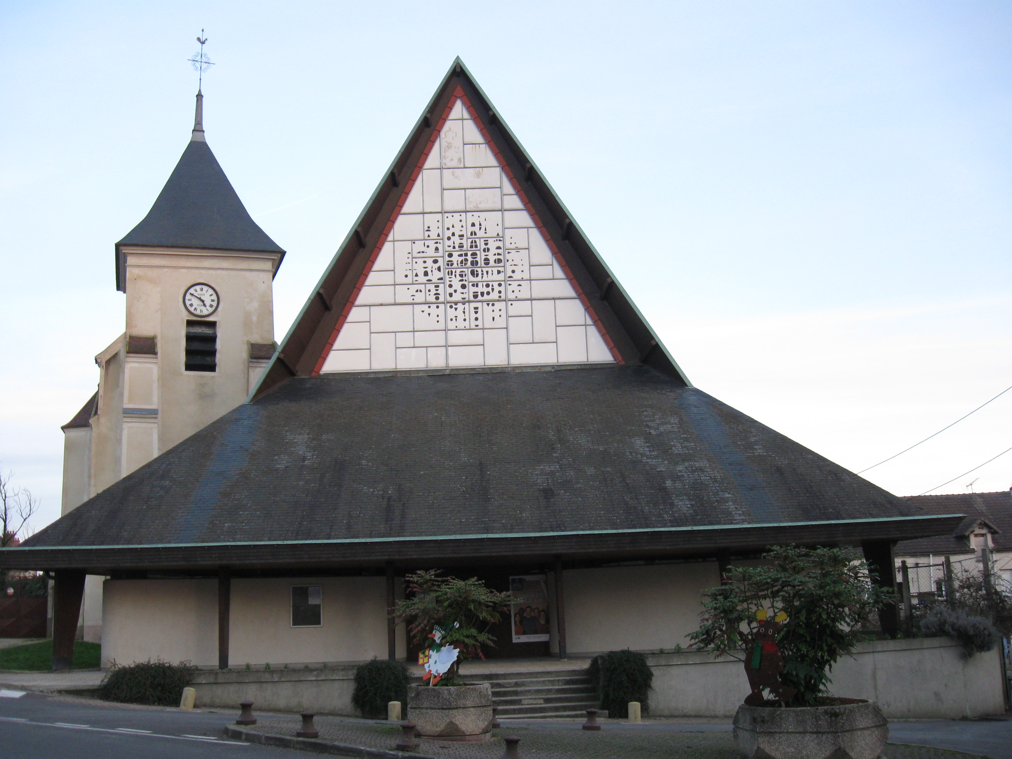 Église Saint-Médard-et-Sainte-Anne de Dampmart. (Seine-et-Marne, région Île-de-France).